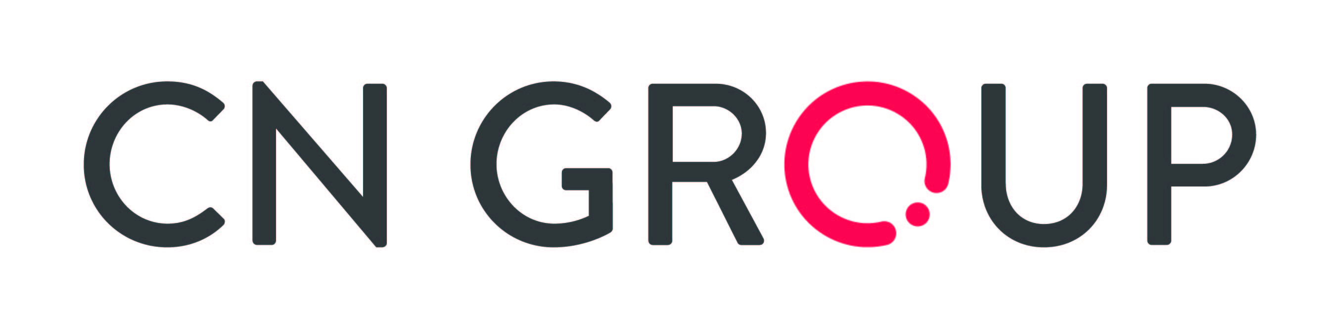 Logo společnosti CN Group CZ a.s.